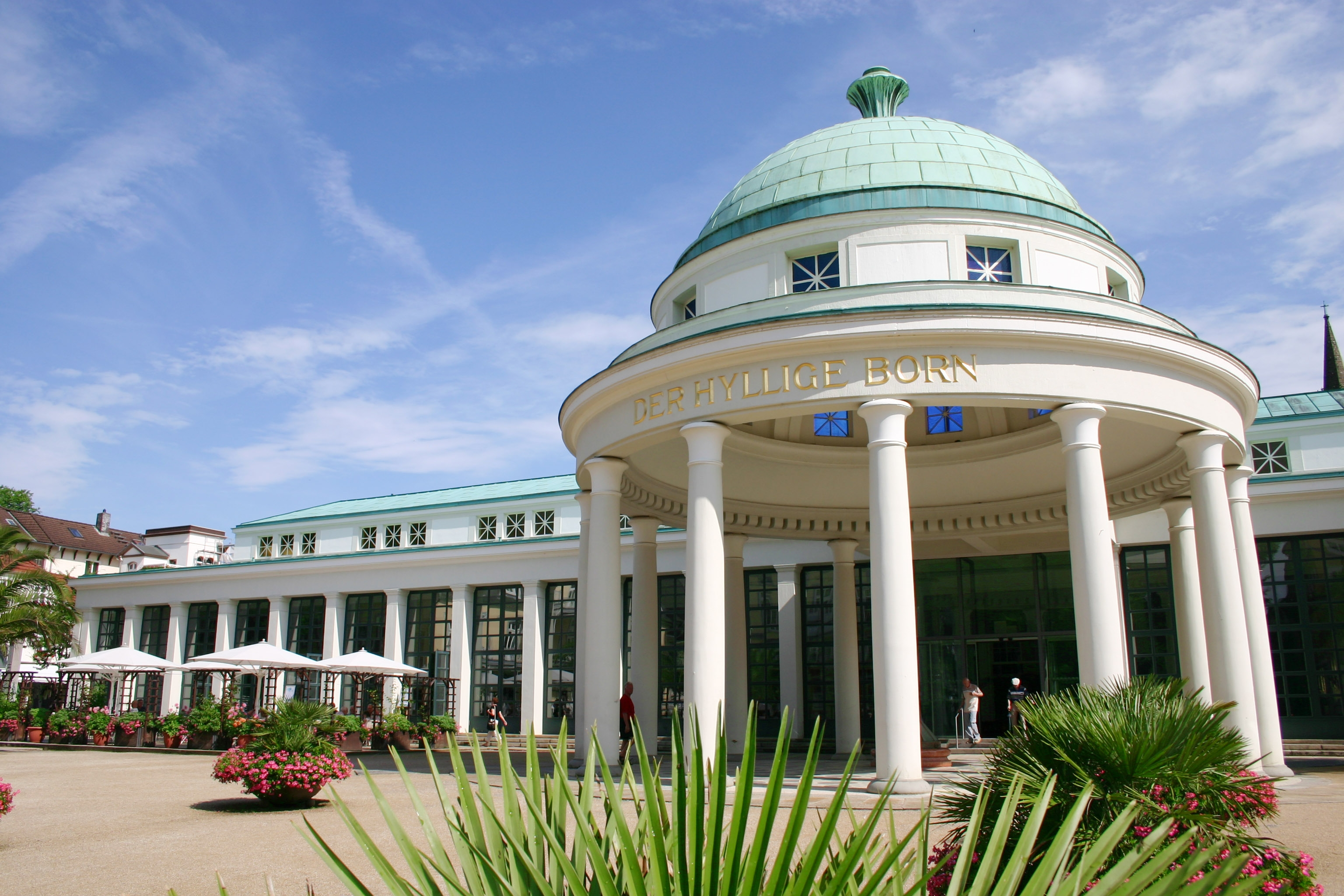 Der Hyllige Born mit Wandelhalle bildet den Mittelpunkt der Stadt